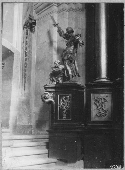 Бережани, офіра Авраама,1